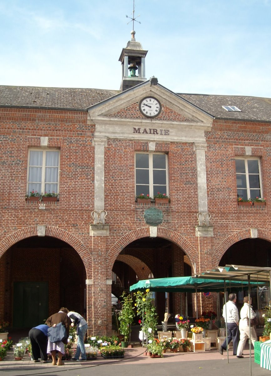 Mairie du Sap